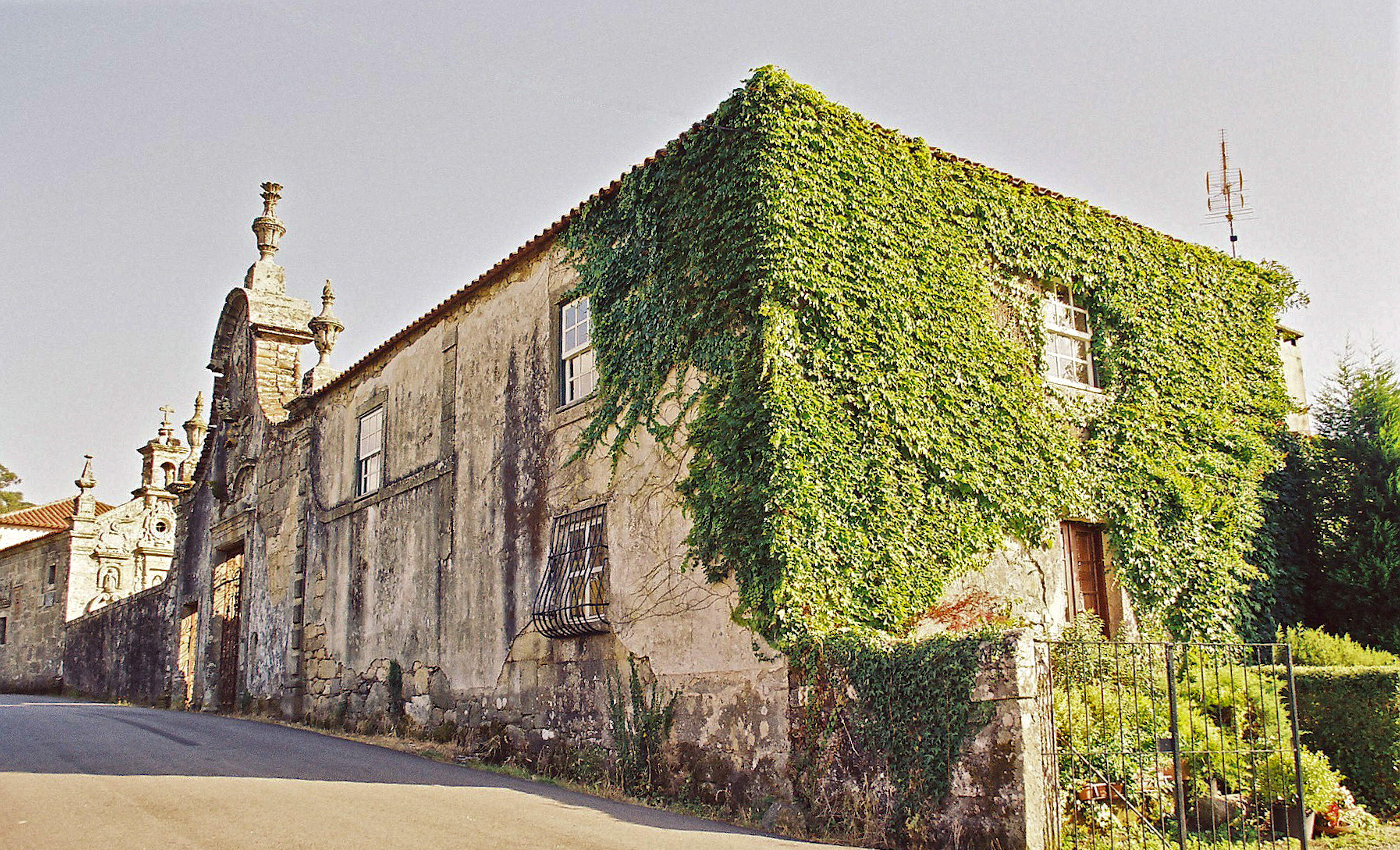 Casa nobre oitocentista, antecedida por um grande portal armoriado, celebrizada no romance de Aquilino Ribeiro A Casa Grande de Romarigães, que nela se inspirou para escrever a crónica de um morgadio courense. (Imóvel de Interesse Público)